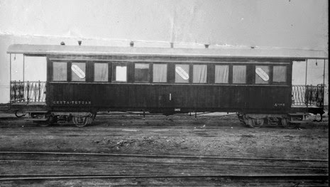 Coche unificado de 1º Clase del Ferrocarril Ceuta-Tetuán, hacia 1930